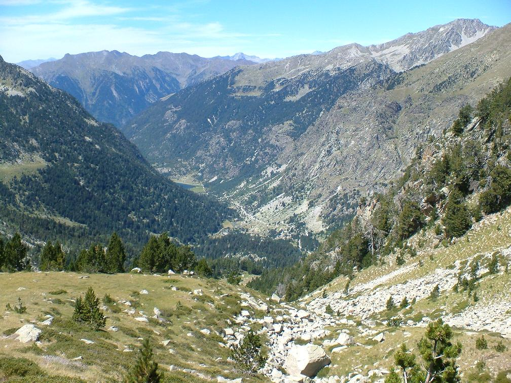 Planell de Sant Esperit, vist desde la Vall de Morrano; la Vall de Boí, Alta Ribagorça, Catalunya